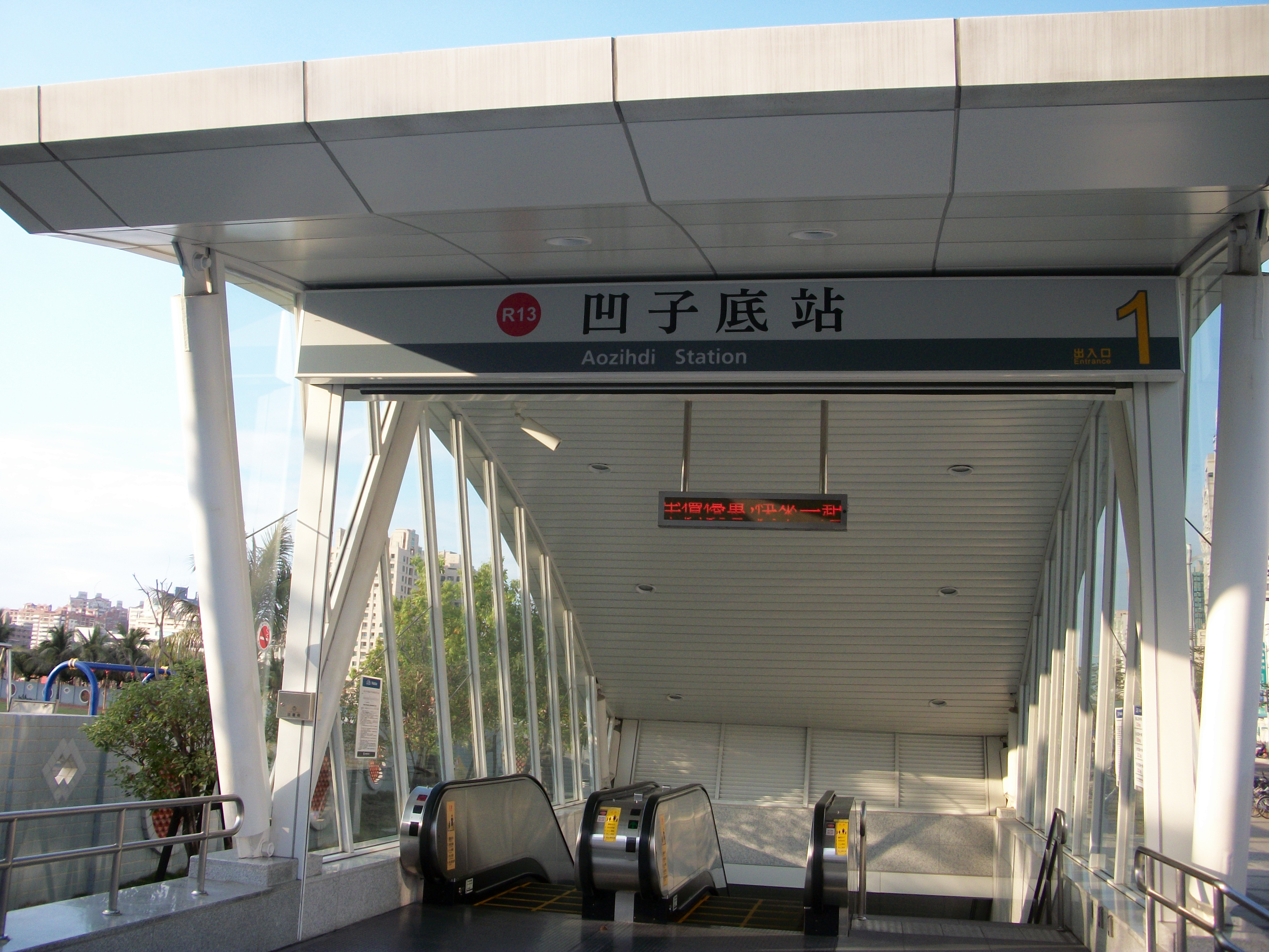 中文（台灣）: 高雄捷運紅線凹子底站一號出口。